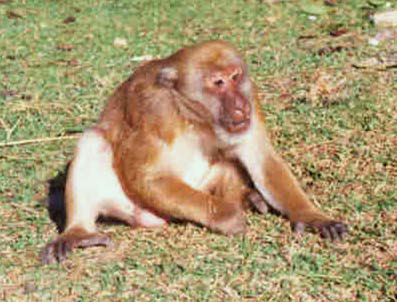 Macaque d'Assam mâle. Photo M. Cooper avec son aimable autorisation.